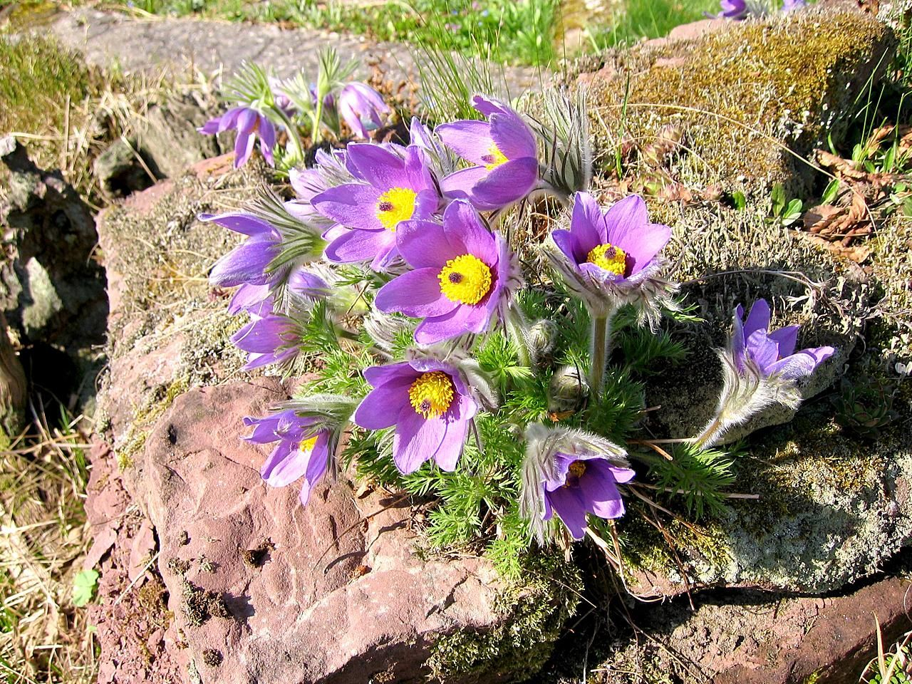 Pulsatilla vulgaris